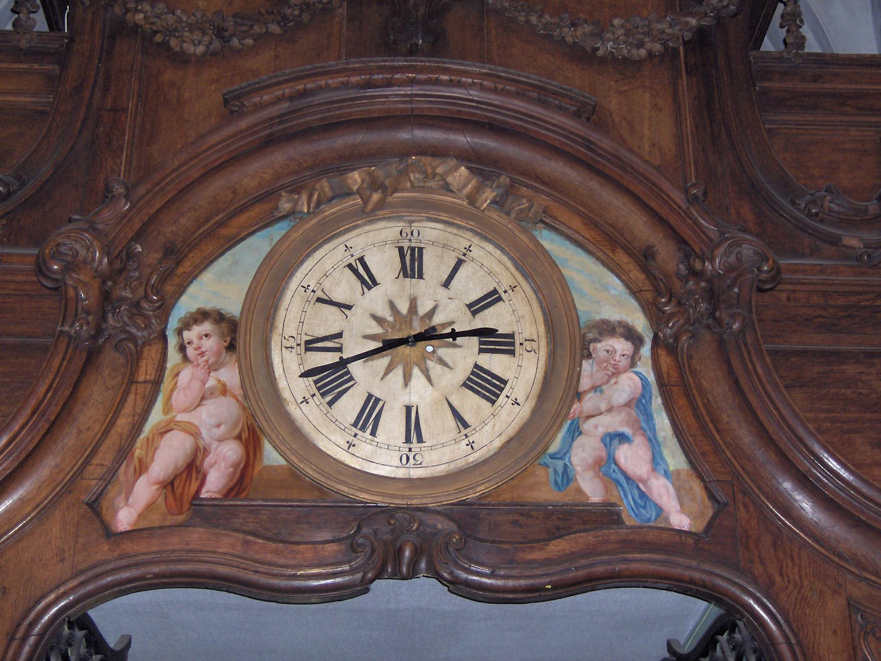 church clock; Onze-Lieve-Vrouw-ter-Duinenkerk; Ostend, Belgium